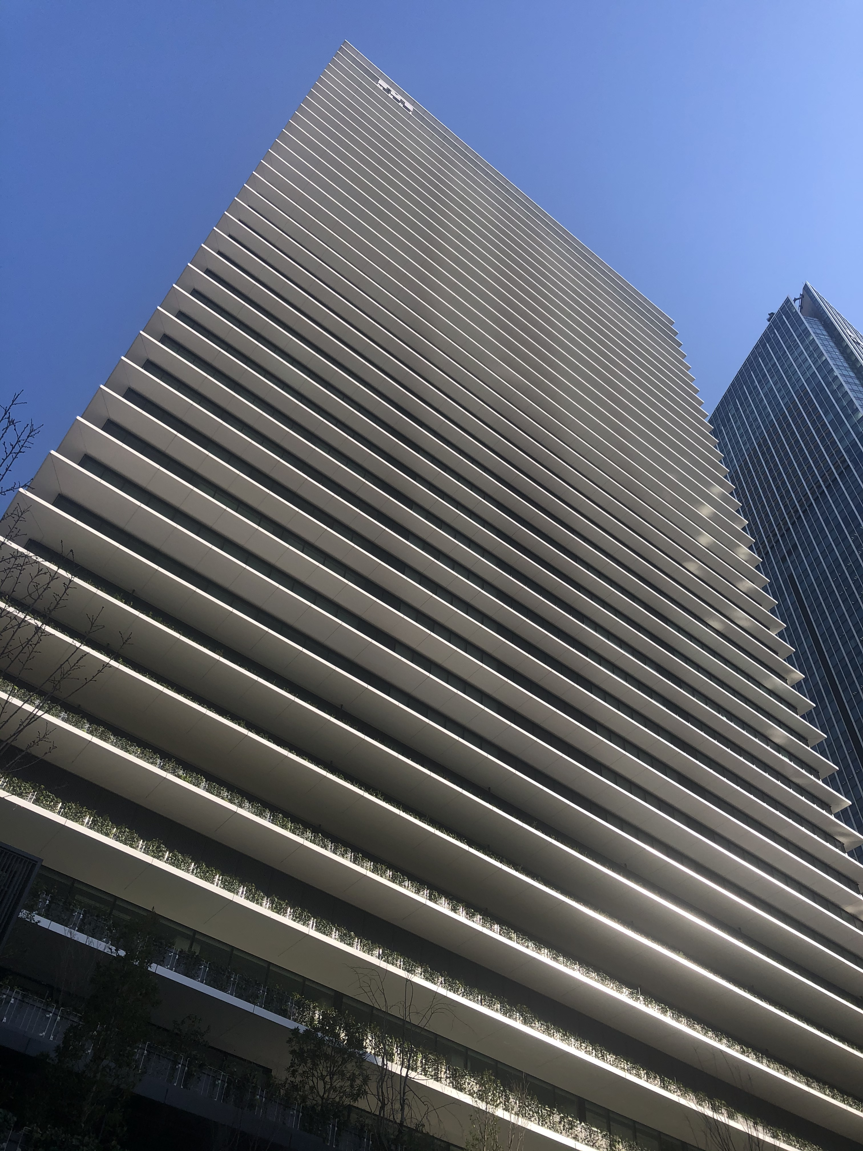 虎ノ門ヒルズビジネスタワー全景